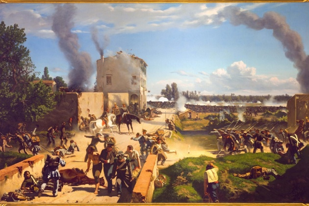 Battaglia di Curtatone e Montanara (29 maggio 1848)